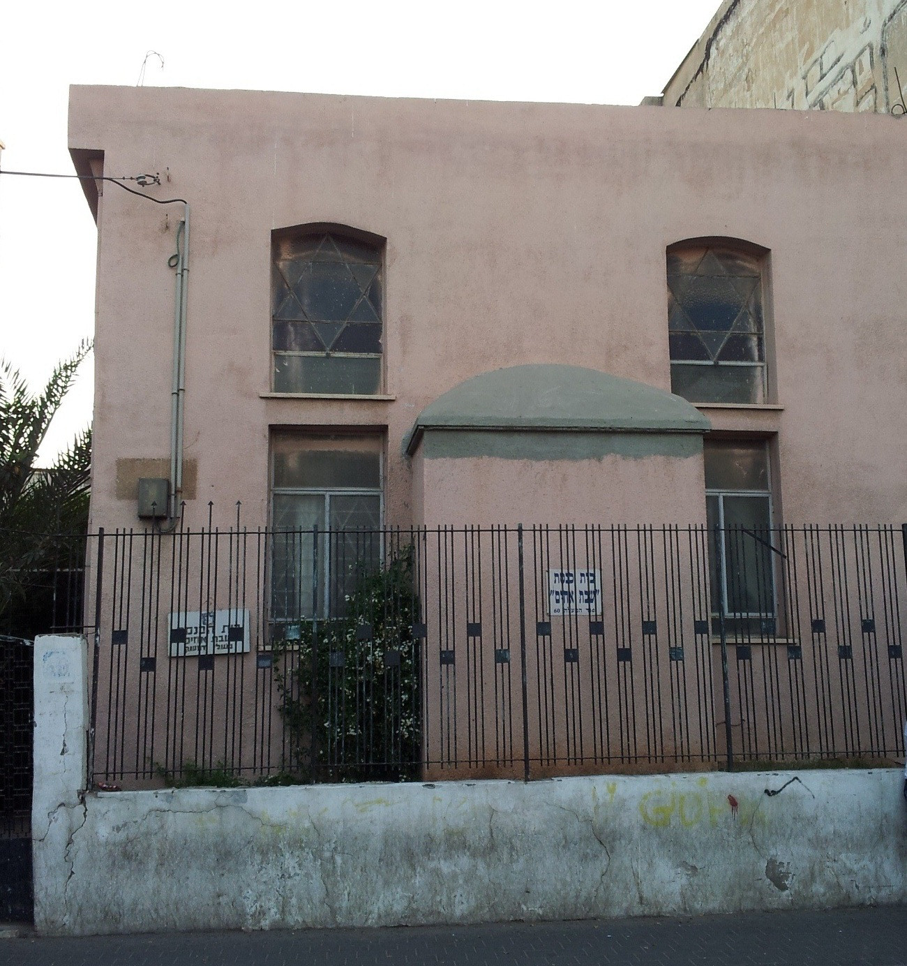 בית הכנסת "שבת אחים" של עולי דמשק ברחוב יסוד המעלה בתל אביב: מבנה, צולם ב-11 ביוני 2012